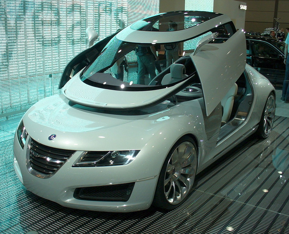 Saab Aero X